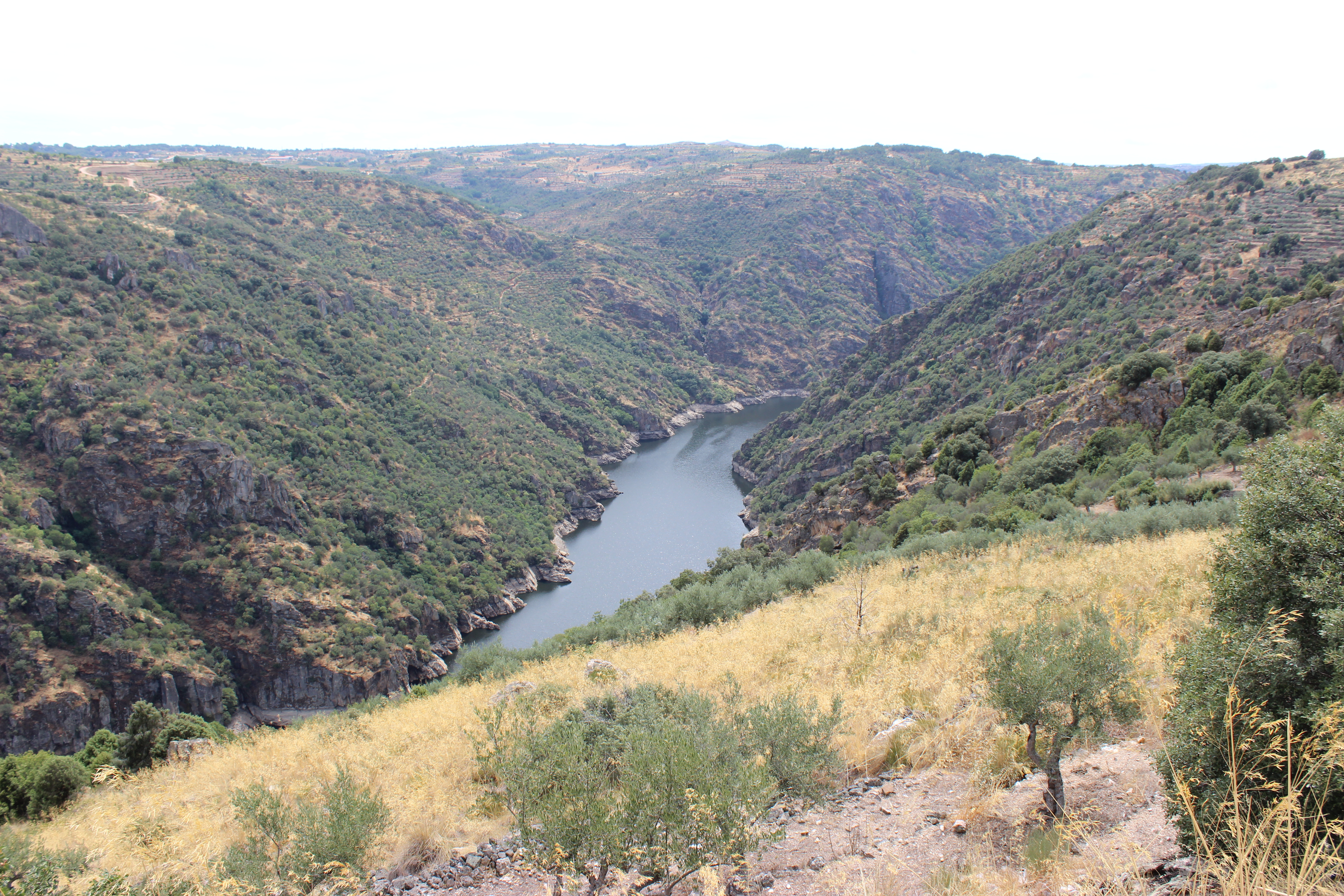 Rio Douro visto desde do Castelo dos Mouros